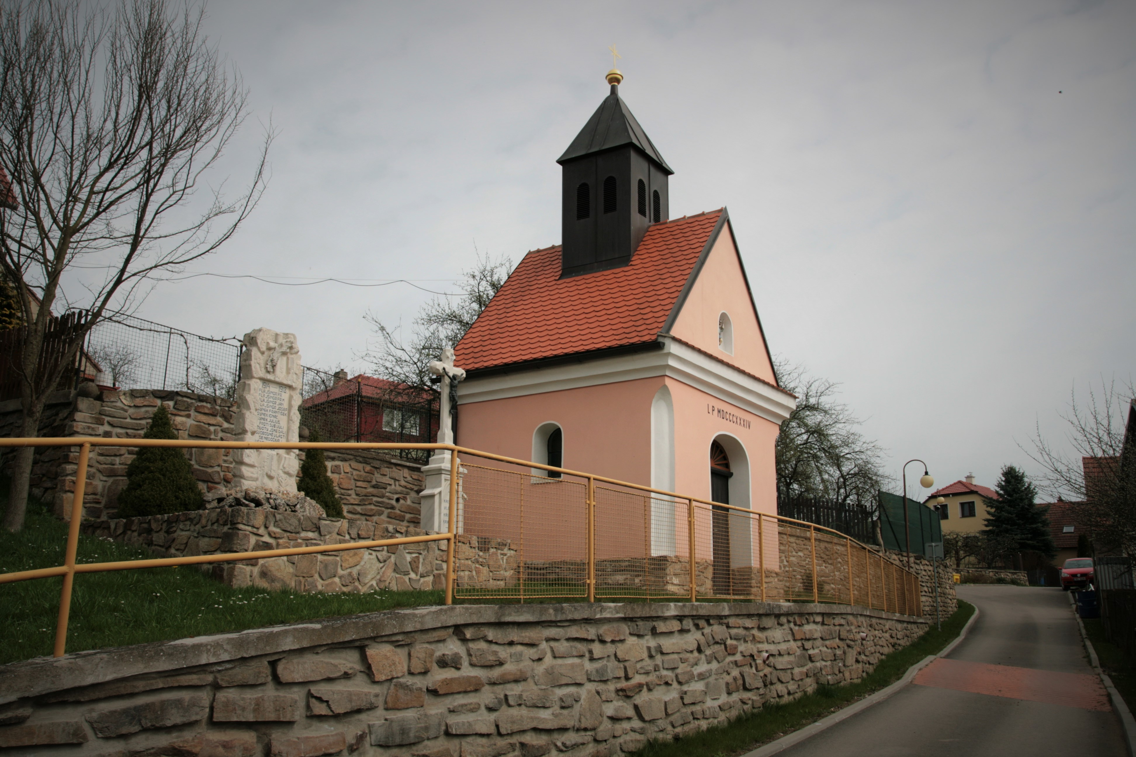 Obec Kaly, okres Brno-venkov. Kaple sv. Máří Magdalény s křížem a pomníkem.